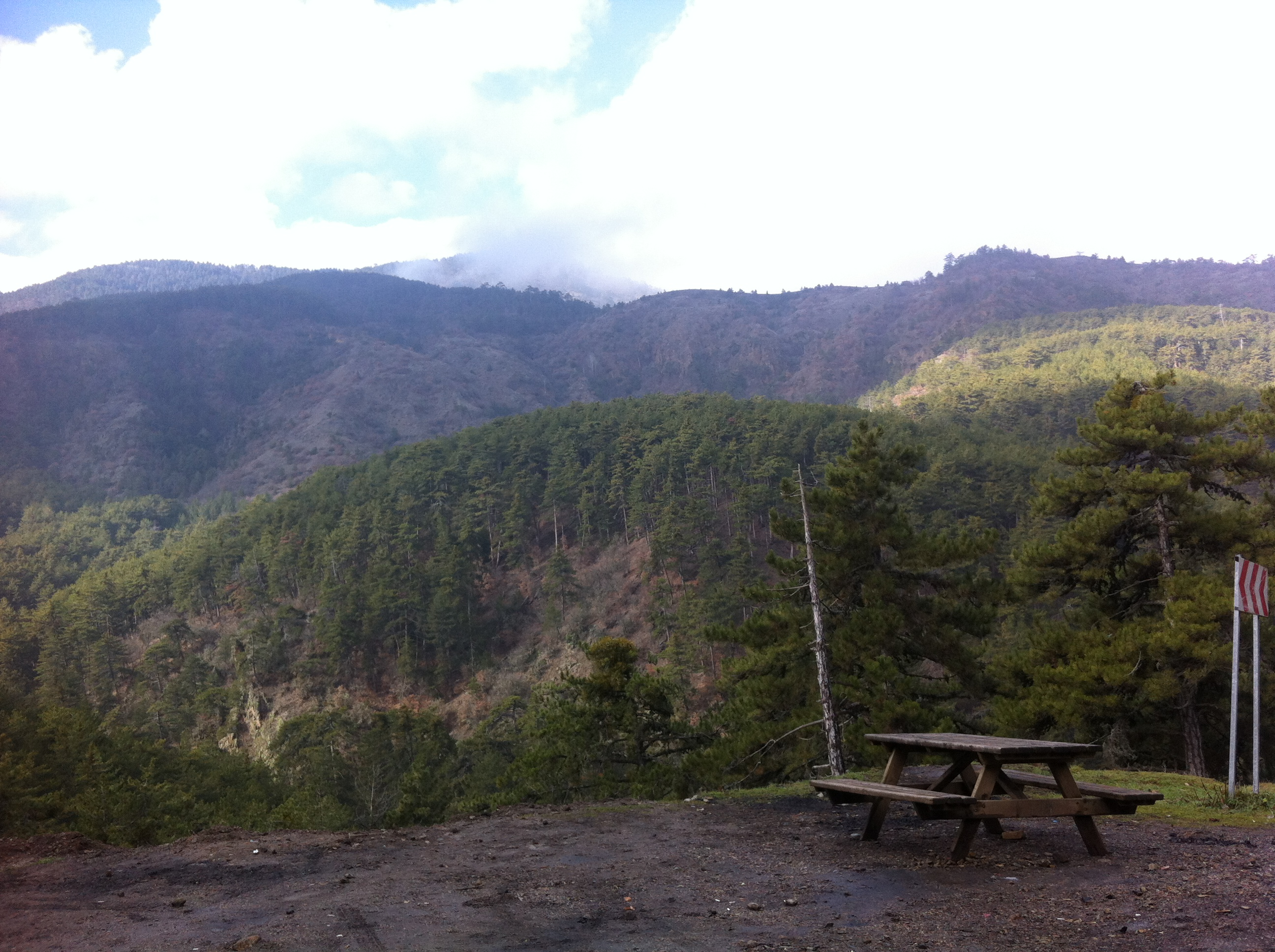 06890 Kızılcahamam/Ankara, Turkey